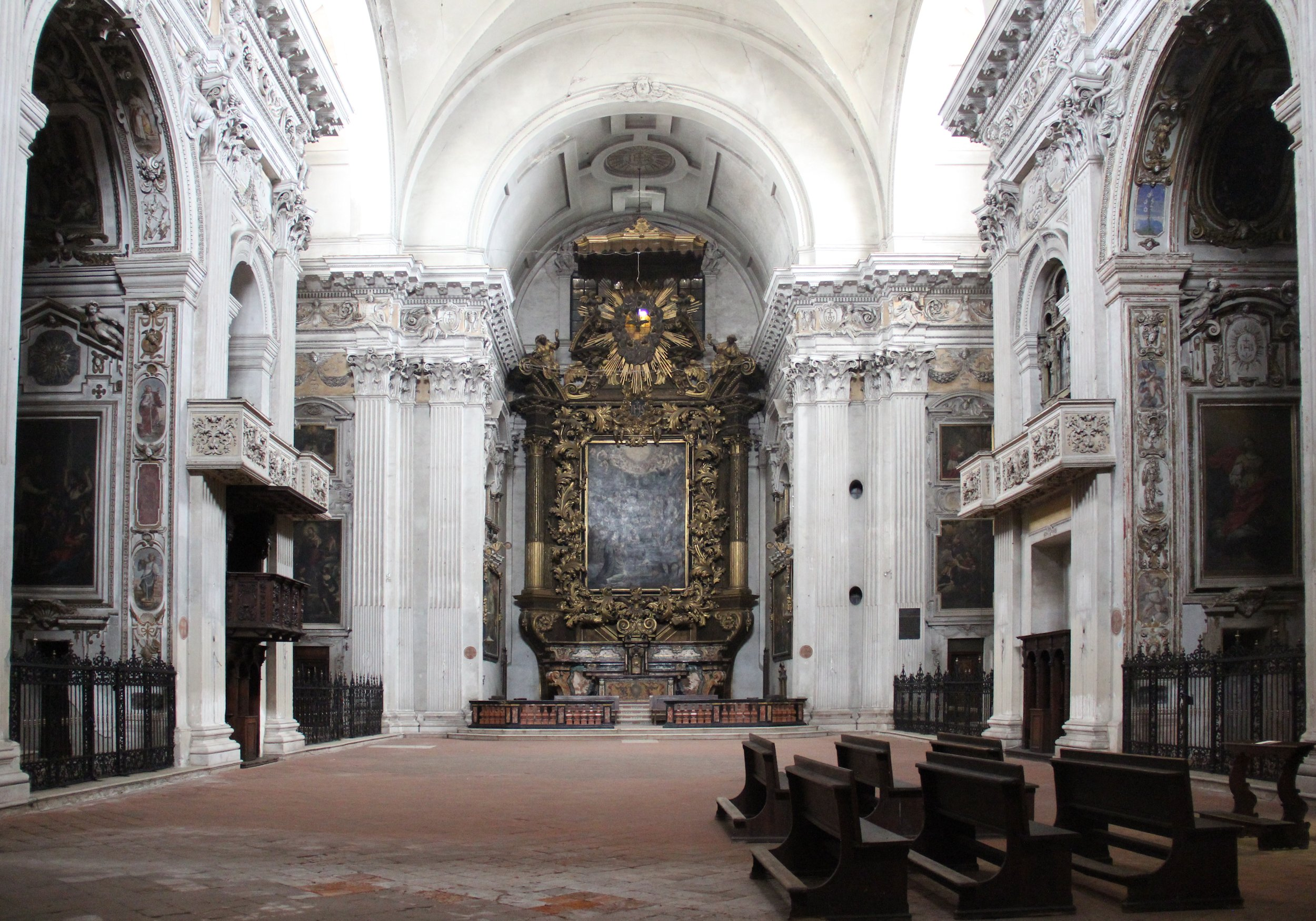 Church of Saints Marcellino and Pietro Native nameChiesa dei Santi Marcellino e PietroLocationCremona, Lombardy, ItalyCoordinates45° 08′ 01.46″ N, 10° 01′ 14.44″ E